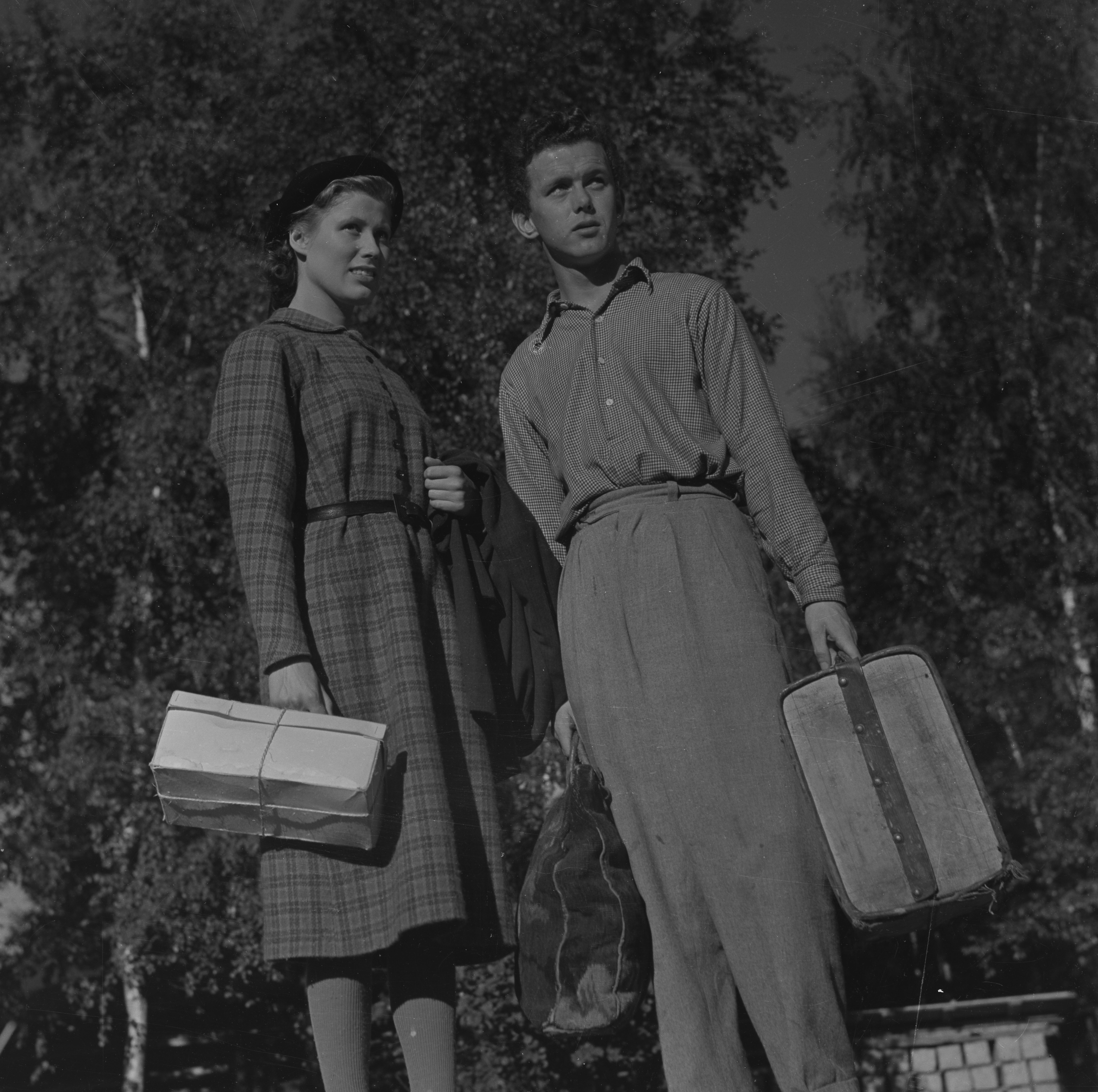 Bildet er hentet fra Arkivverket. Foto fra innspillingen av den norske filmen "Andrine og Kjell". Arkivinstitusjon : Riksarkivet Arkivnavn : Billedbladet NÅ Sted : Norge, Ukjent, Ukjent, Avbildet